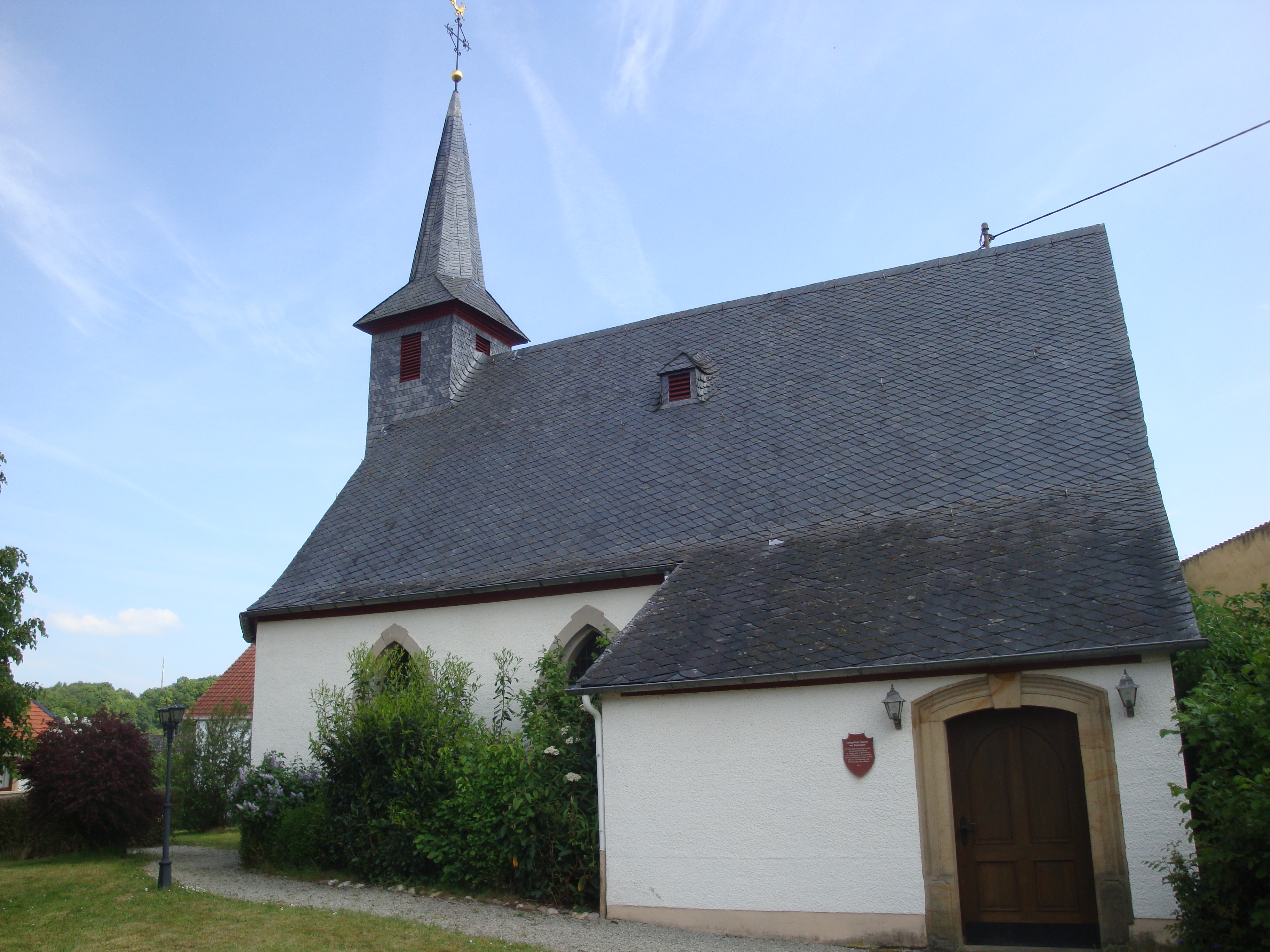 Evangelische Kirche Bärweiler